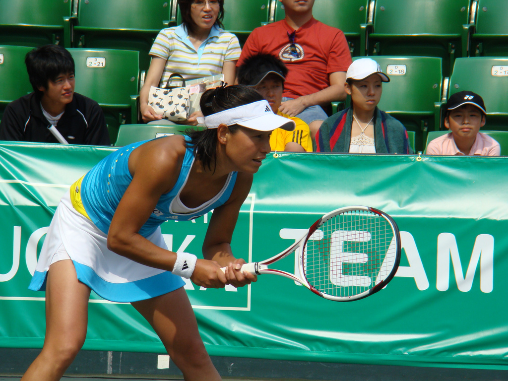 Feat. Kimiko Date-Krumm Feat. Kimiko Date-Krumm